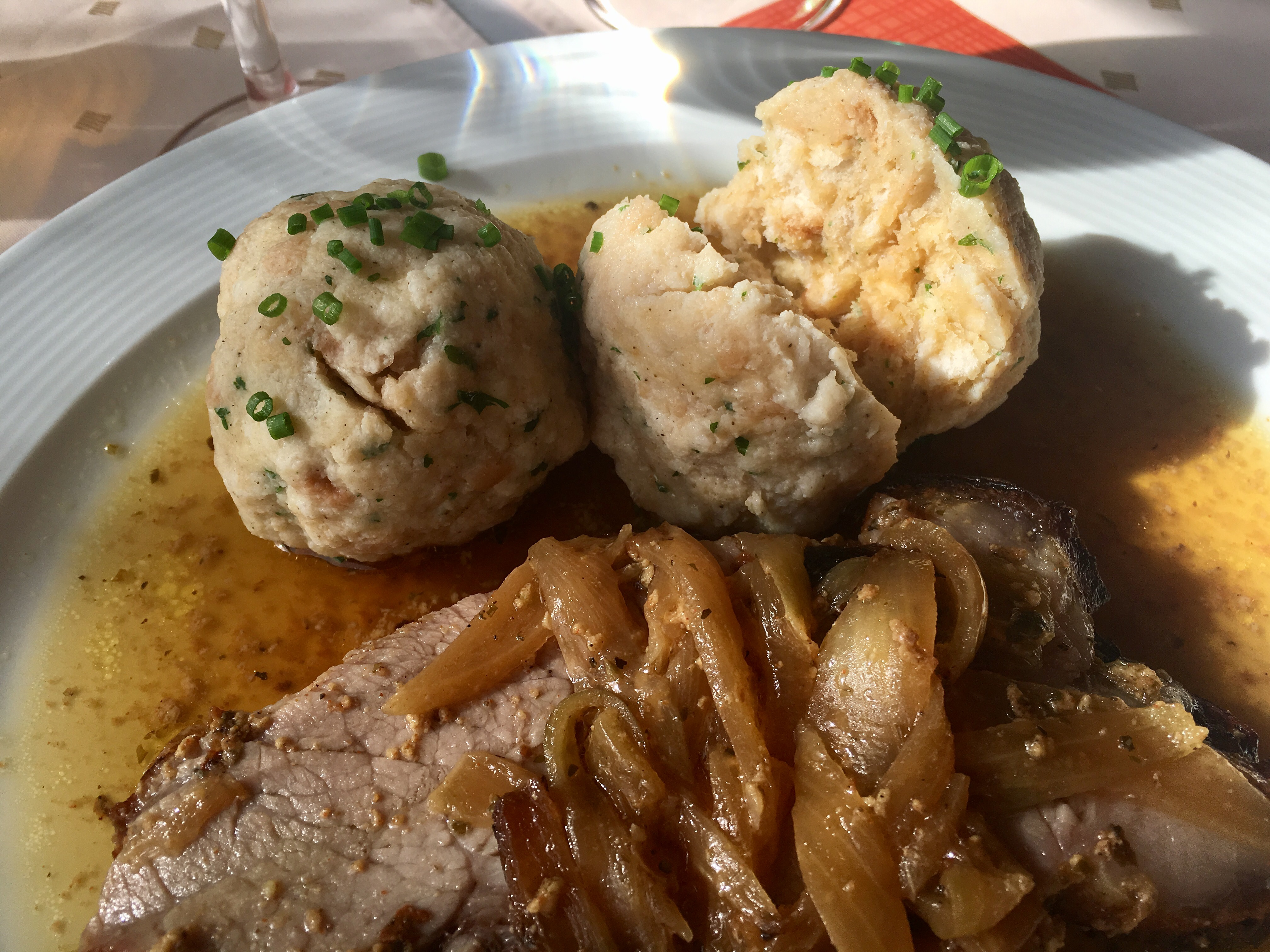 Sämpyläknöödeli